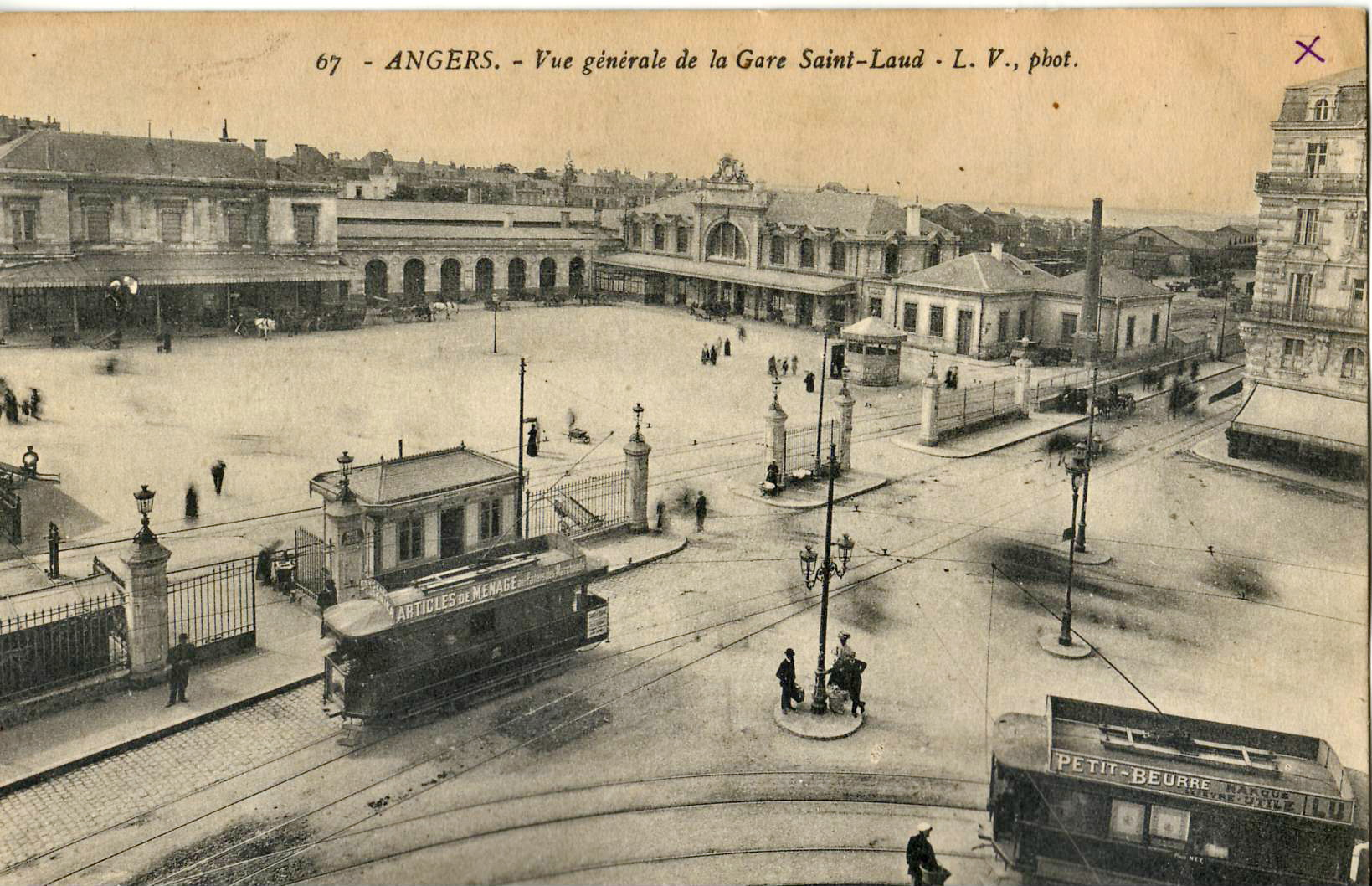 Carte postale ancienne éditée par L. V. phot., n°67 : ANGERS - Vue générale de la Gare Saint-Laud